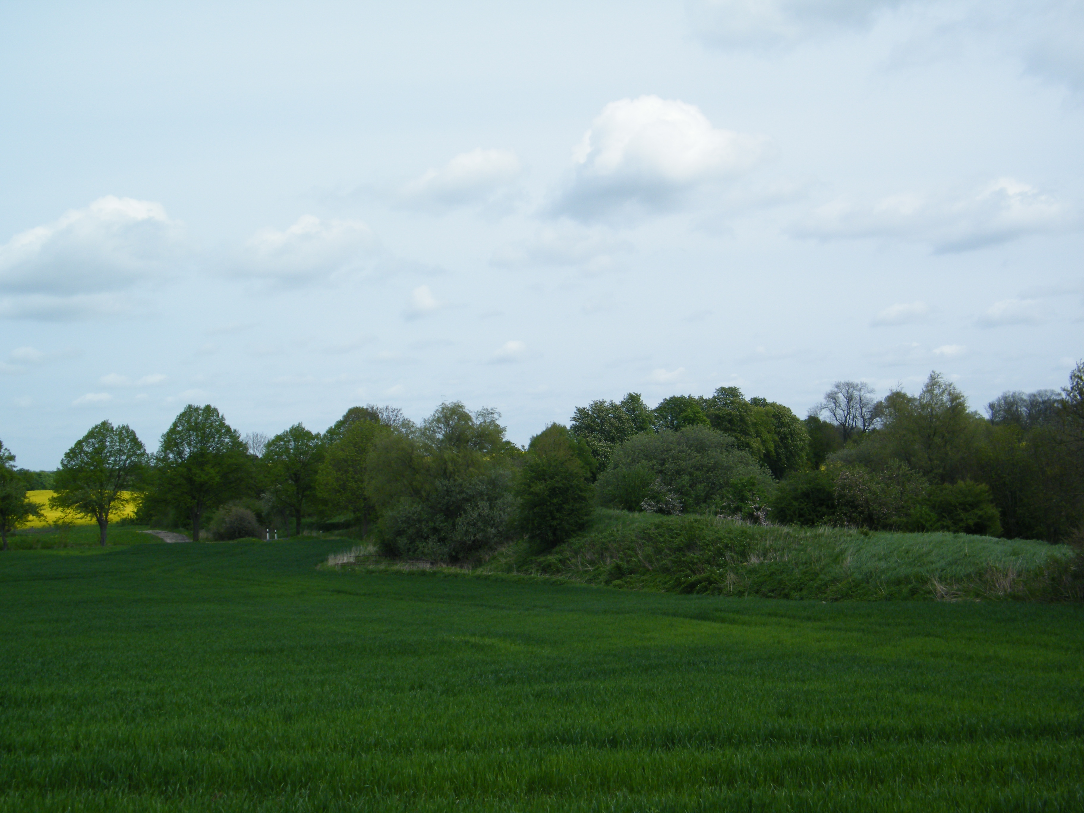 Bahnstrecke Fährkrug–Fürstenwerder, Damm der geplanten Verlängerung nördlich des Bahnhofs Fürstenwerder